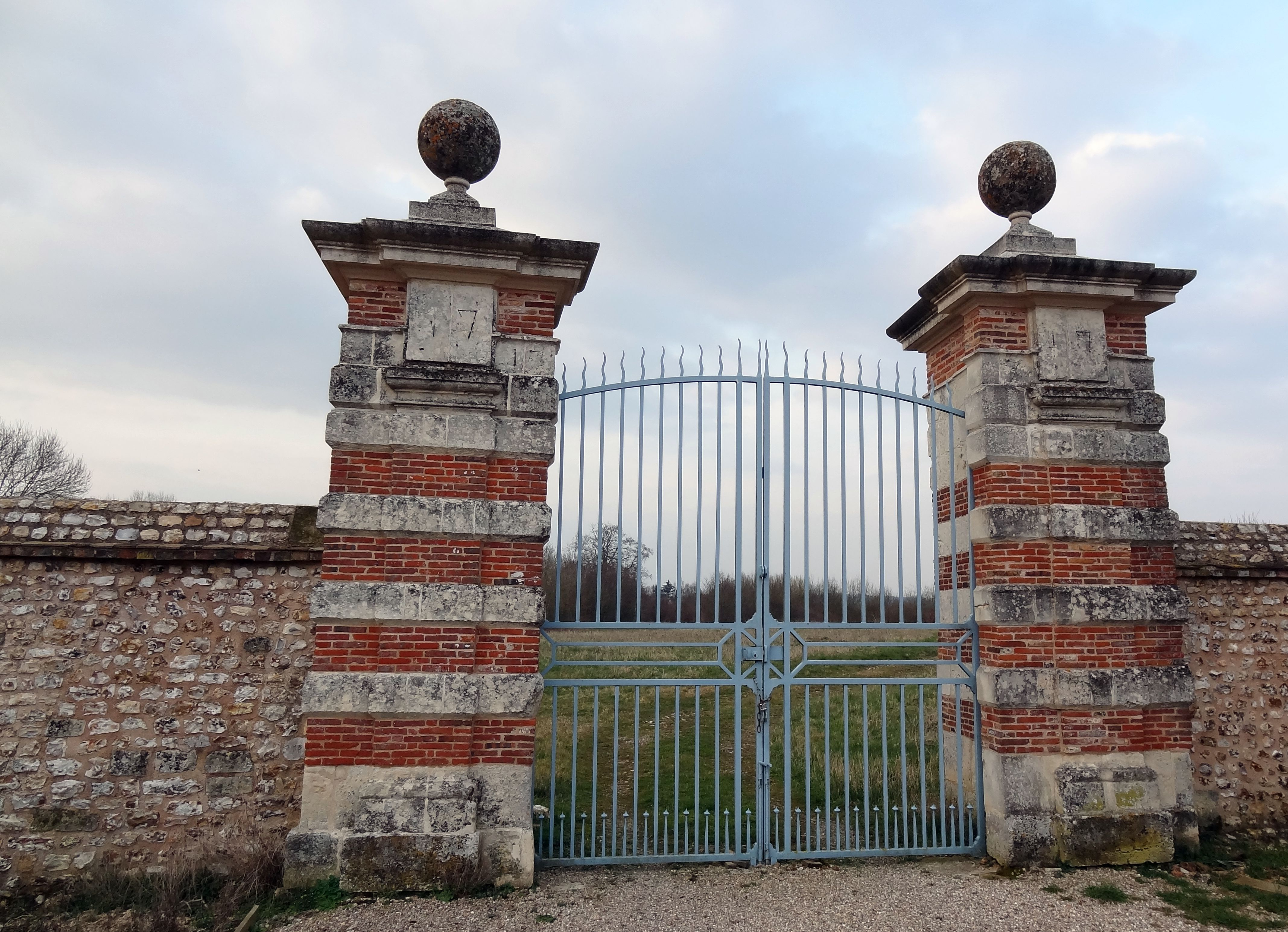 La Commanderie de Saint-Étienne-de-Renneville était une maison Templière prospère au Moyen-Âge. Elle est situé près d'Evreux en Normandie. On y voit le portail.